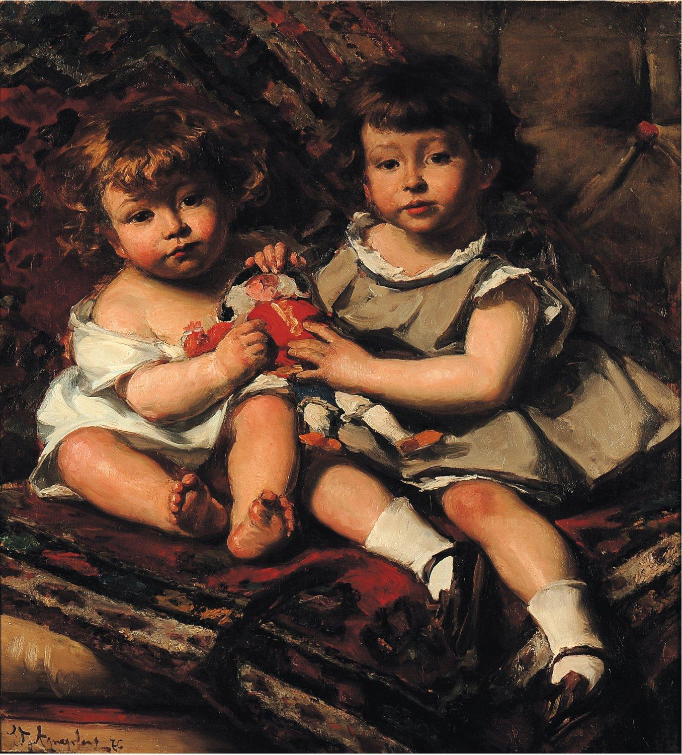 Les enfants Janssens ou les enfants au polichinelle